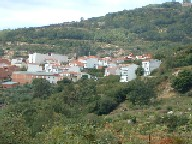 Una vista panorámica del pueblo serrano y extremeño de El Torno Tomada por Tio floro